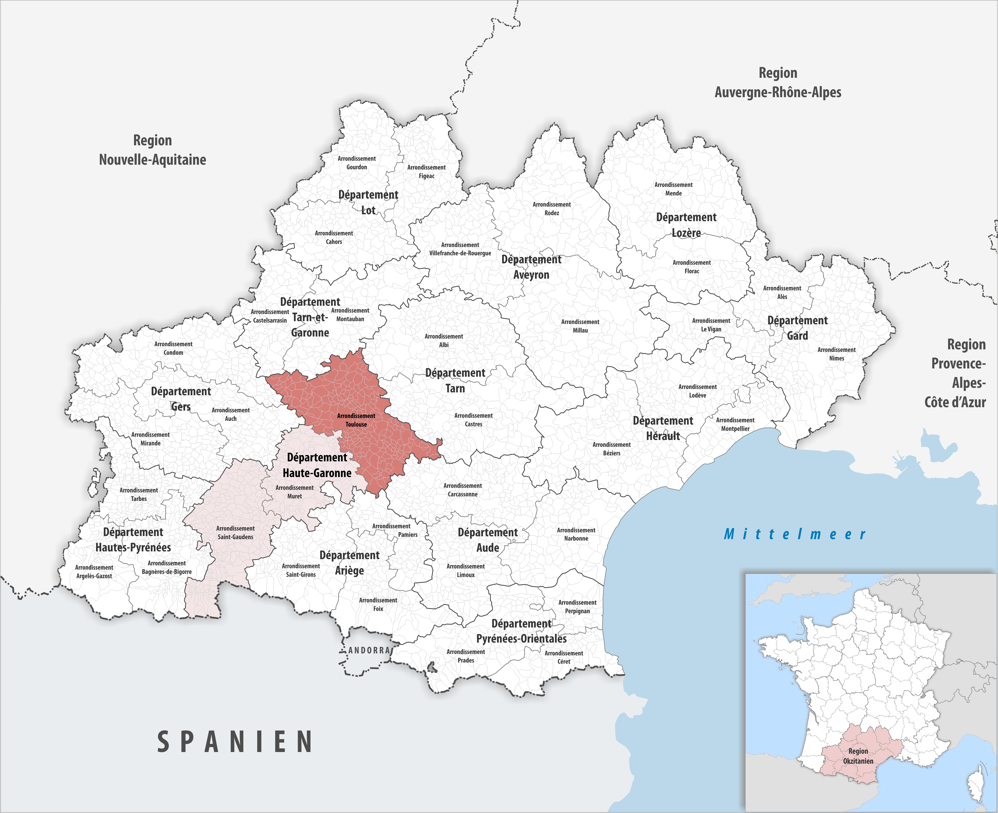 Lage des Arrondissements Toulouse